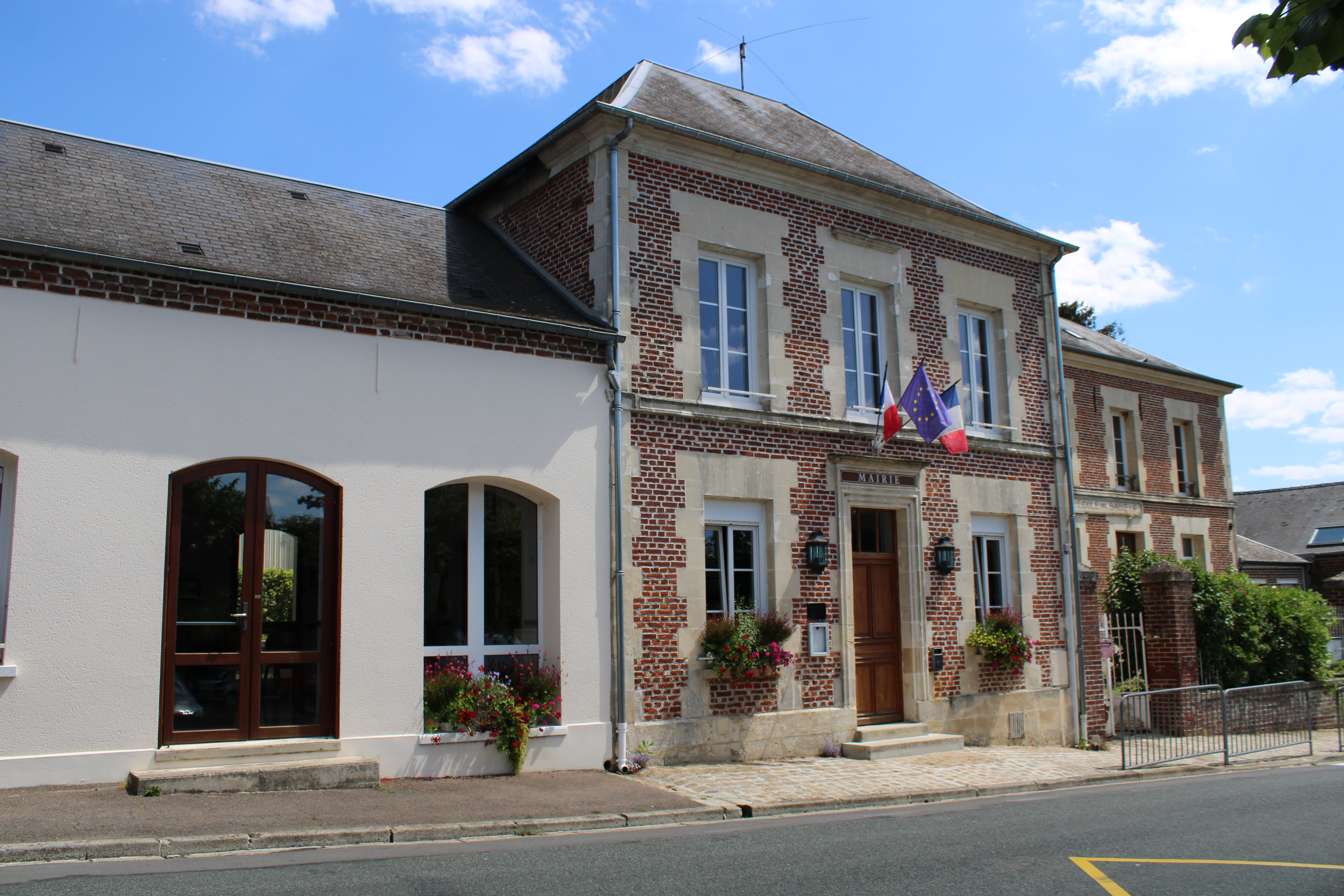 La mairie